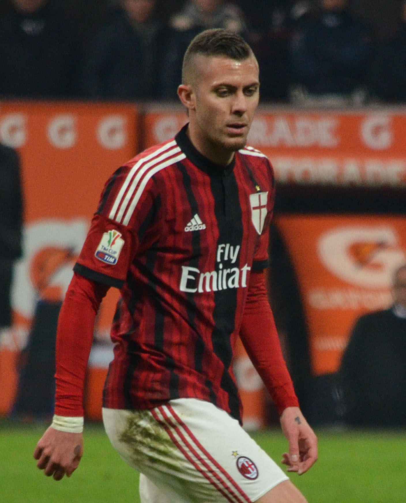 J. Menez in Milan-Lazio di Coppa Italia 2015